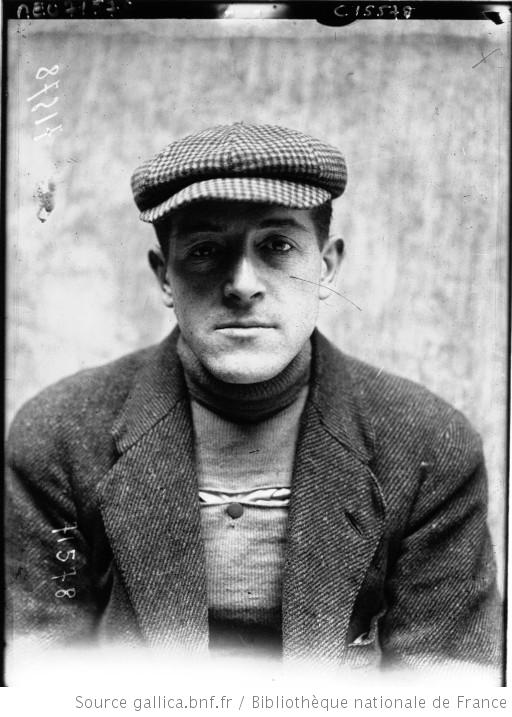 Paris-Roubaix cycliste : André Huret